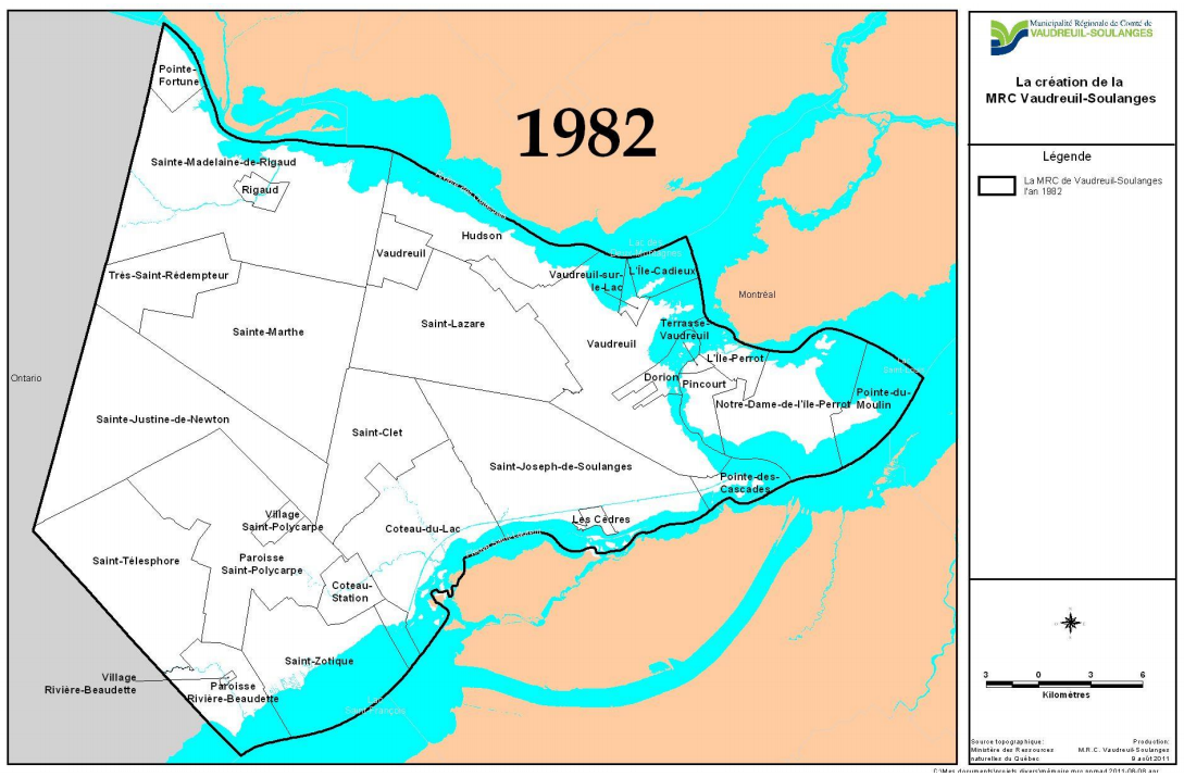 1982 - Vaudreuil-Soulanges